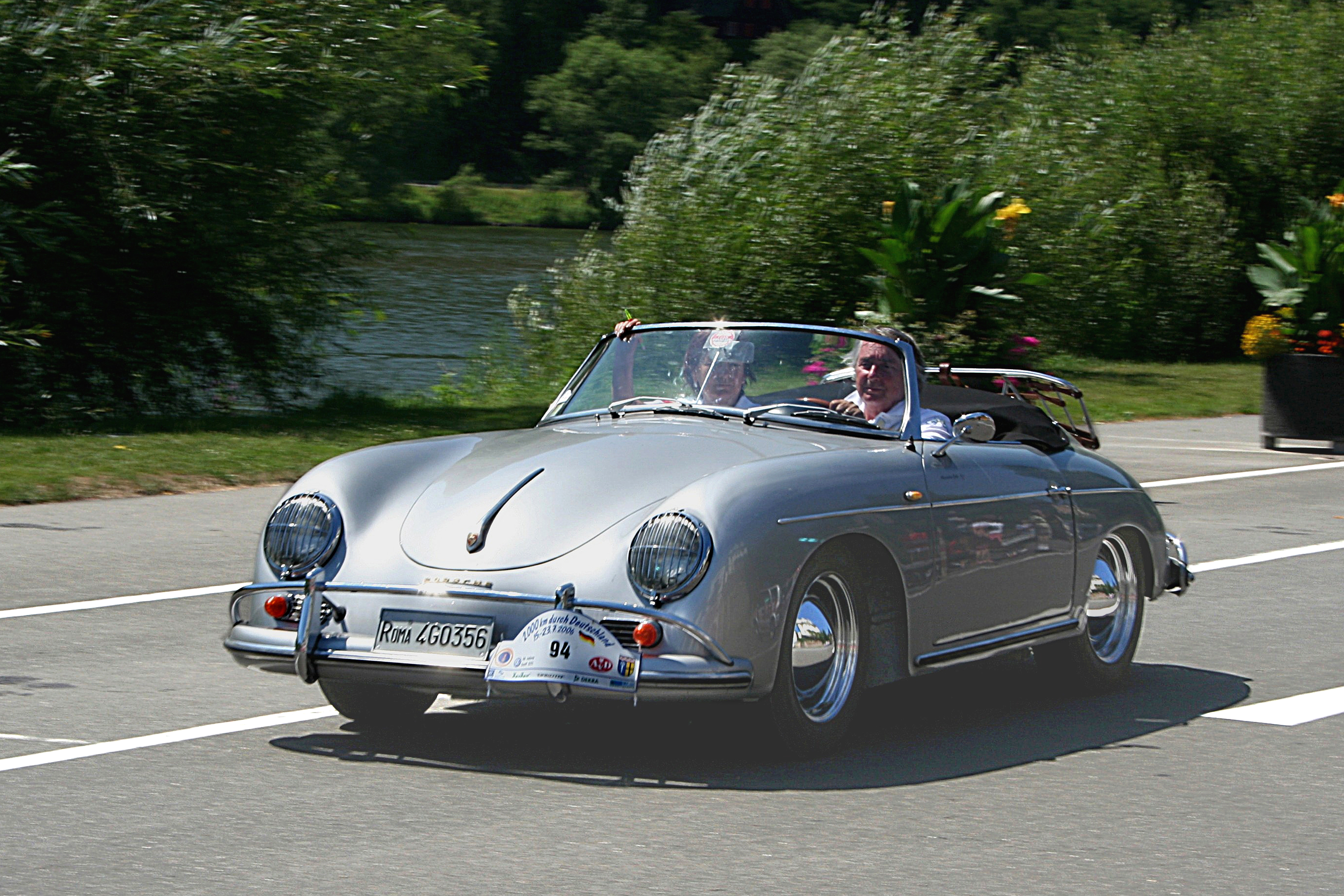 Bildbeschreibung: Porsche 356 A Convertible 1600 S, Baujahr 1958 Datum: 16.07.2006 bei "2000 km durch Deutschland" in Traben-Trarbach (Mosel)